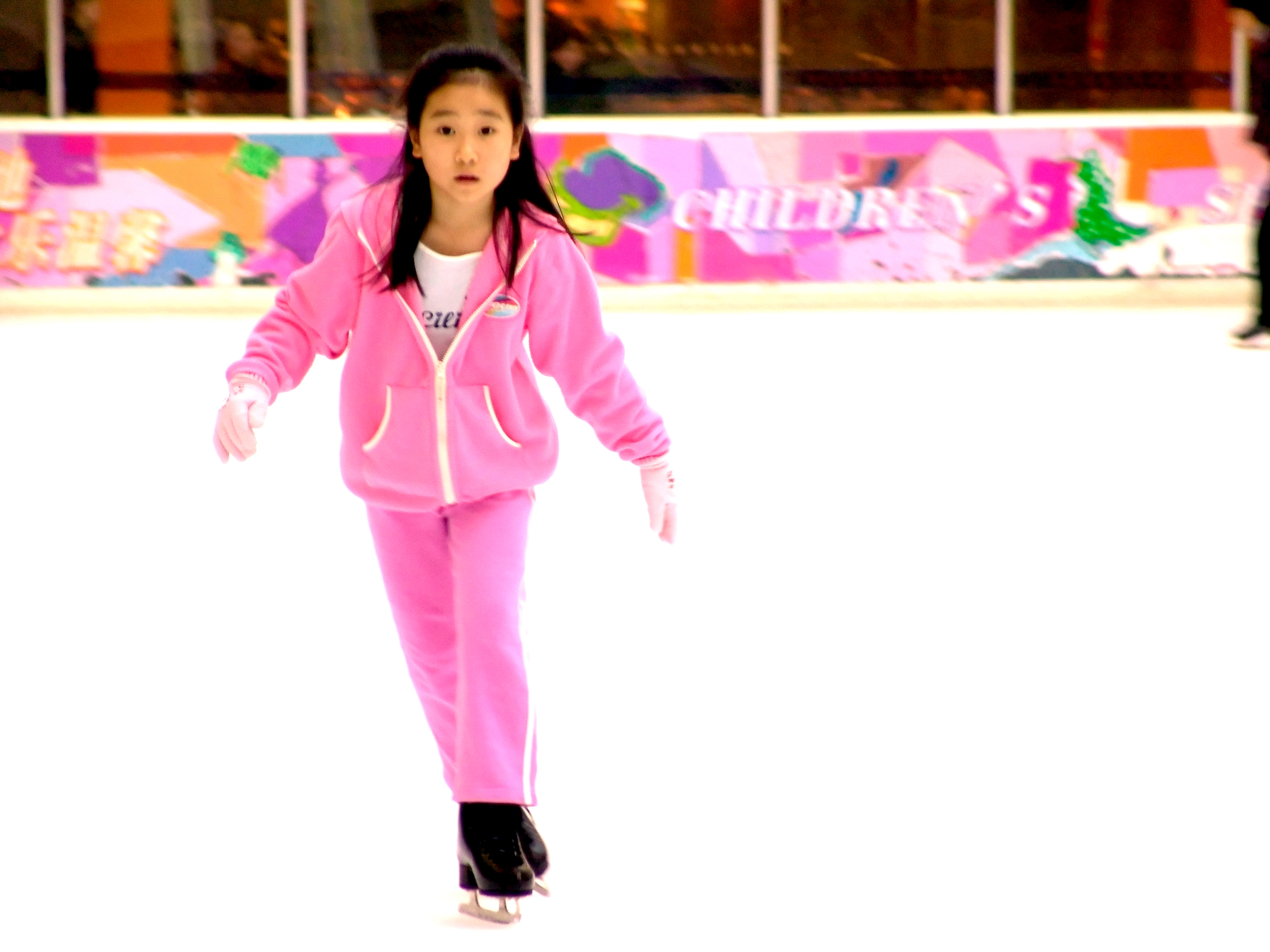 A young girl, ice-skating